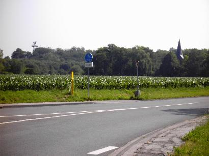 Das alte Oberbolheim mit dem Fliegerhorst Nörvenich aufgenommen von papa1234 am 30.6.06